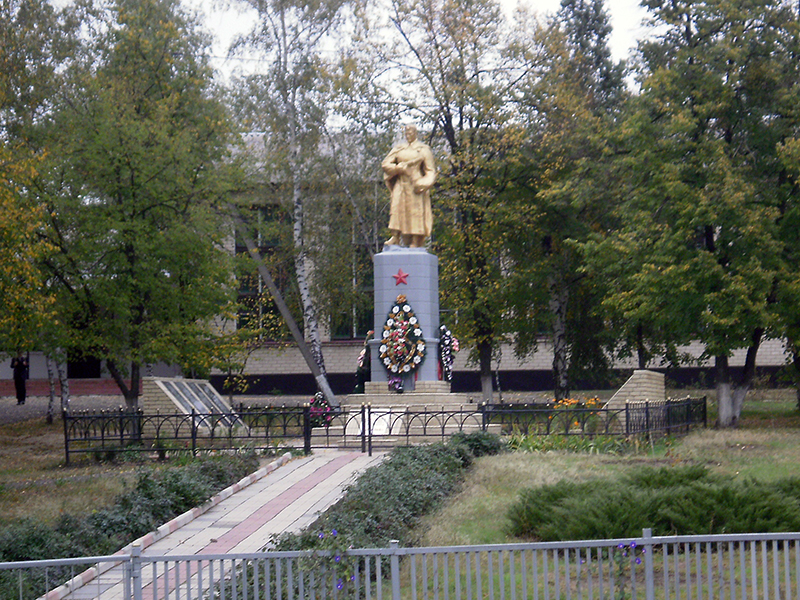 Изюмский район